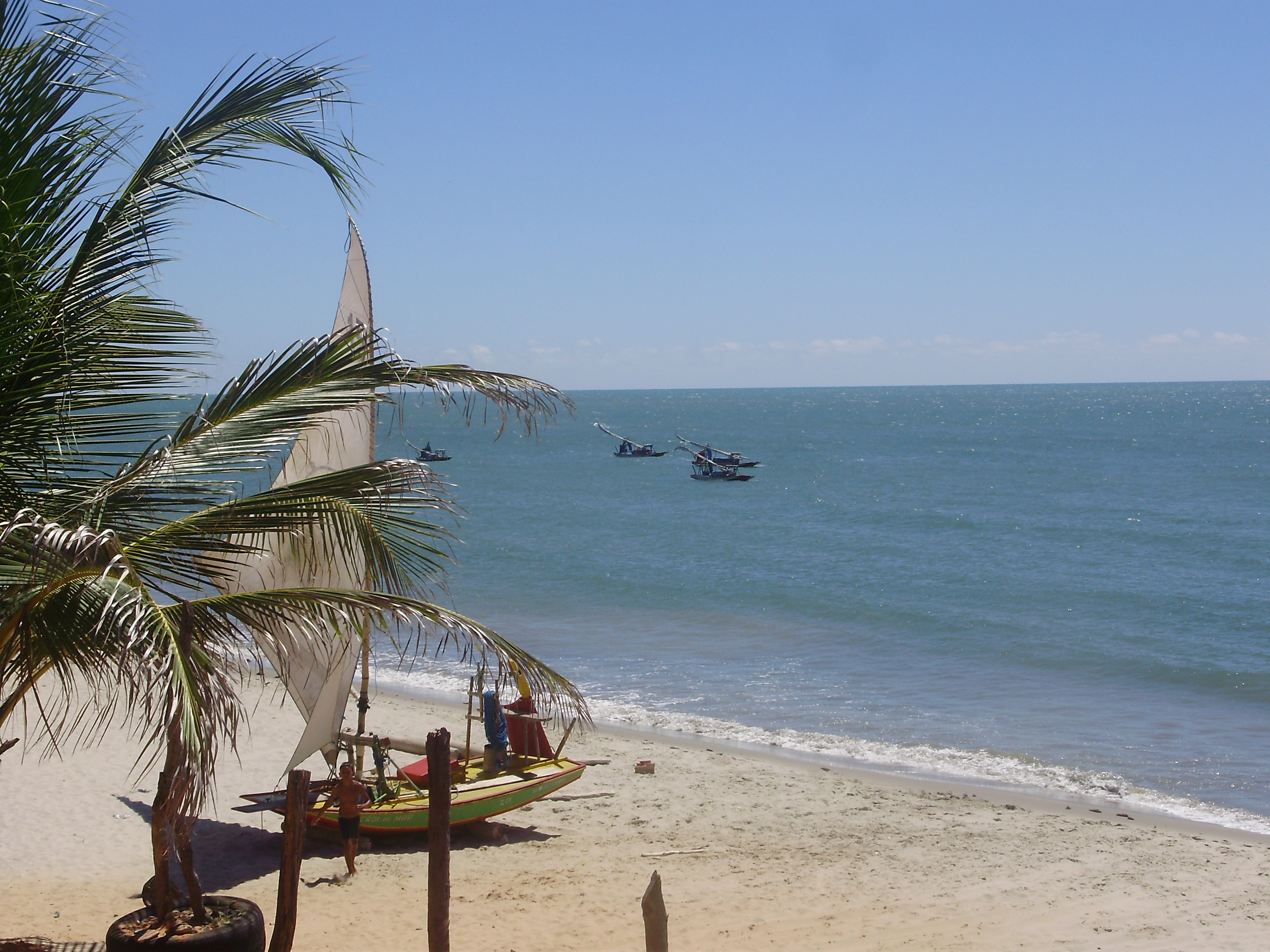 uma das praias mais linas do mundo!